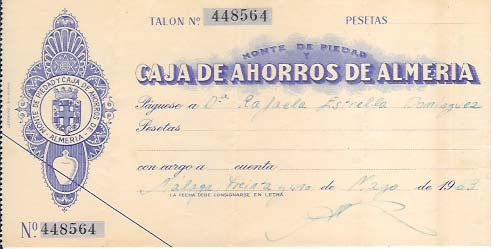 Talón de los años 60 del Monte de Piedad y Caja de Ahorros de Almería, España, documento digitalizado procedente de Archivo Familiar.